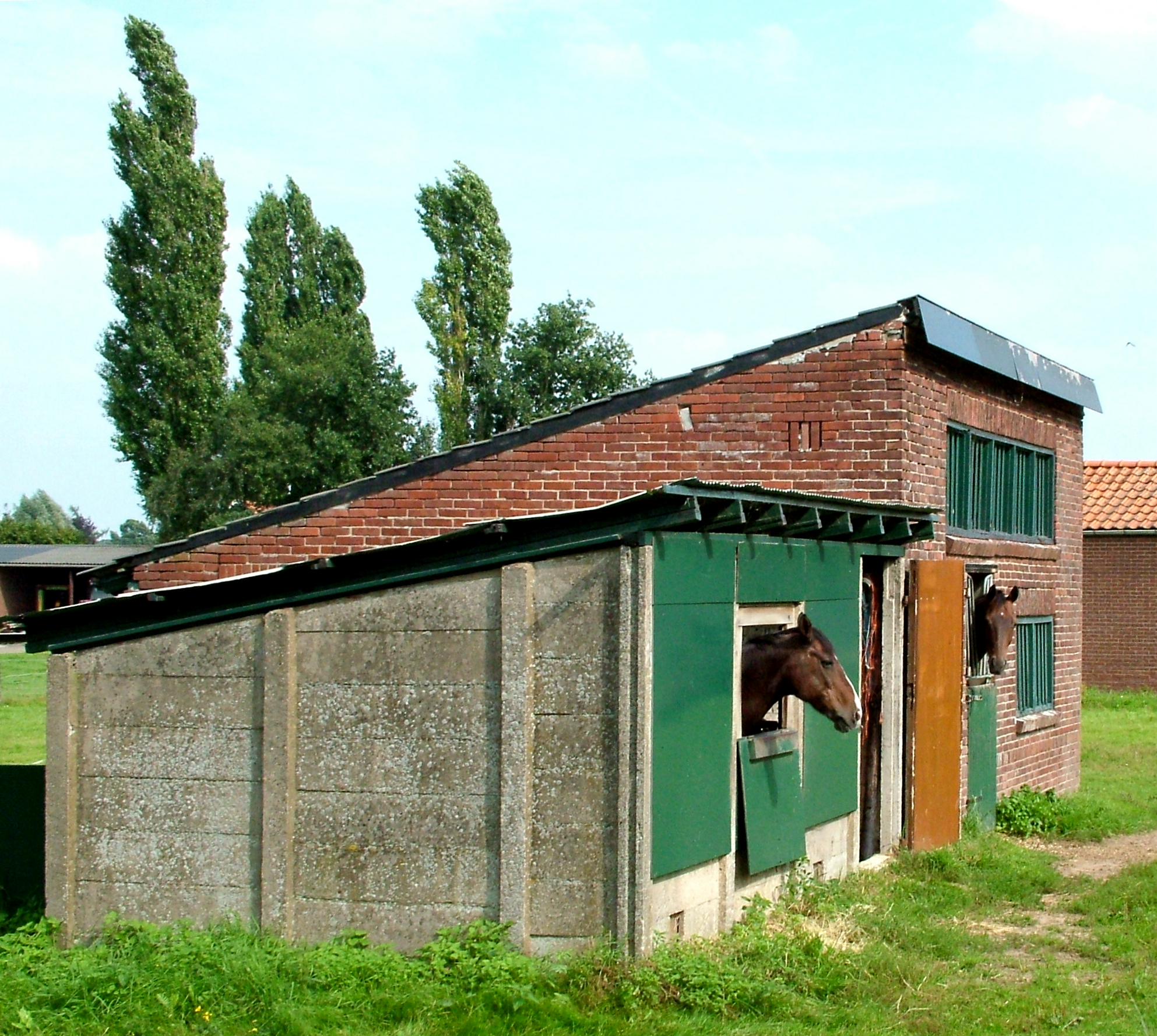 Paarden in Silvolde, Oude IJsselstreek